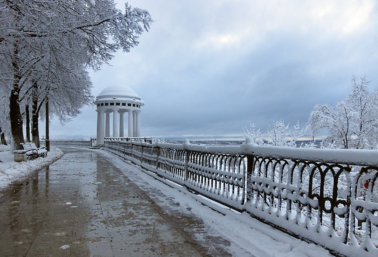 Набережная Которосли